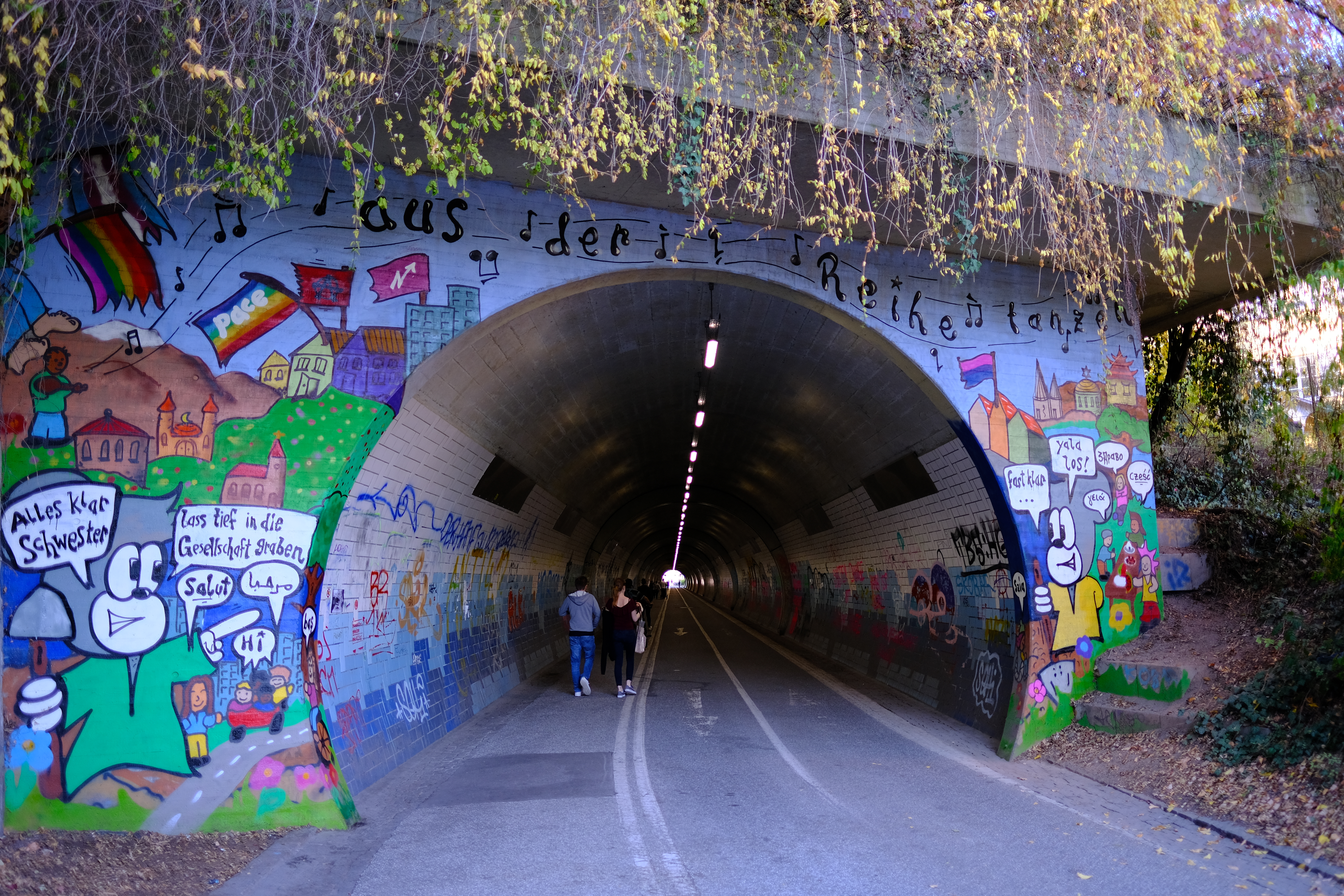 Tübingen. Südportal des Fußgängertunnels durch den Schlossberg.